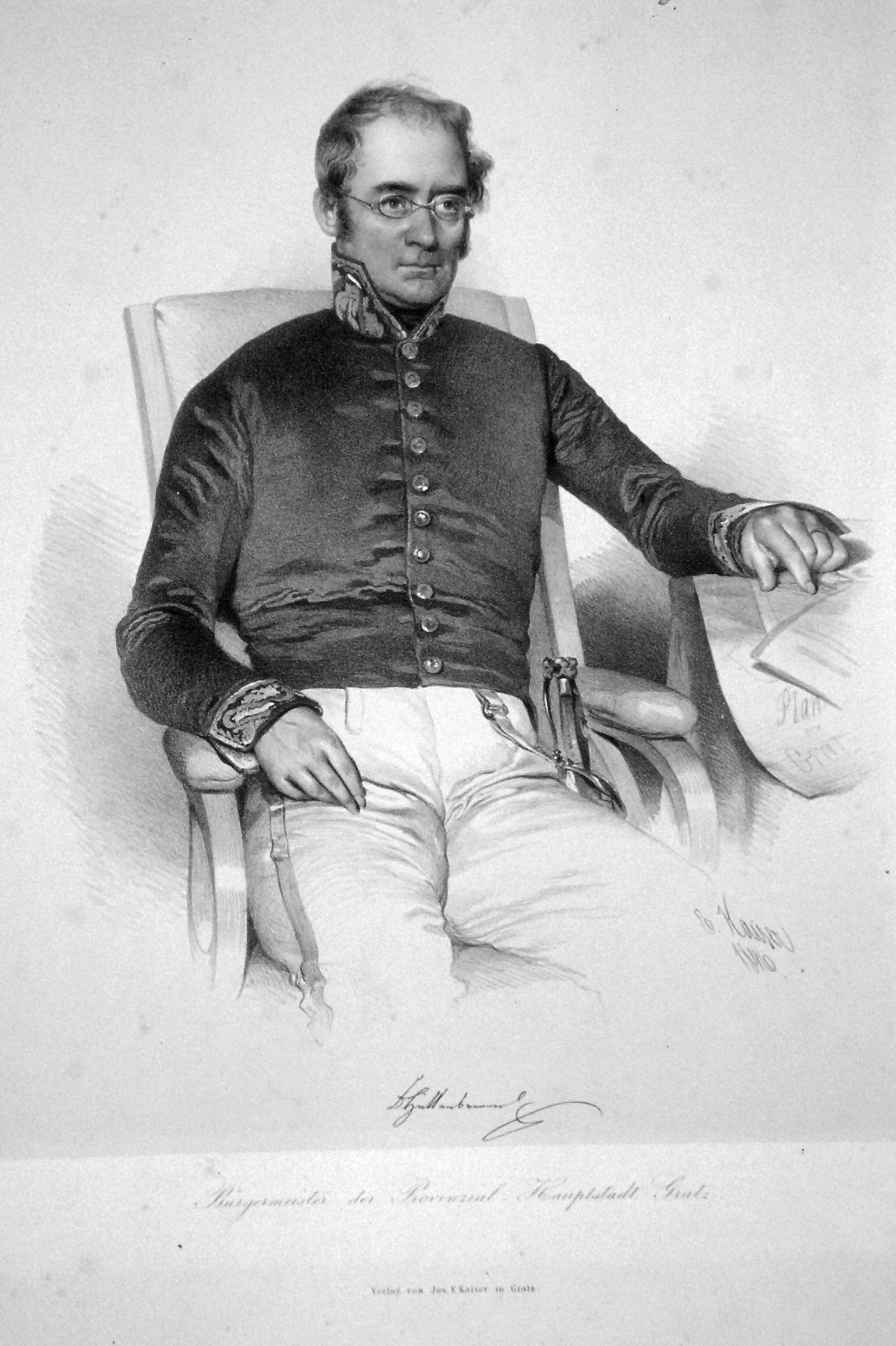 Andreas von Hüttenbrenner (1797-1869), österreichischer Jurist und Politiker. 1844-1848 Bürgermeister von Greaz. Lithographie von Eduard Kaiser, 1846